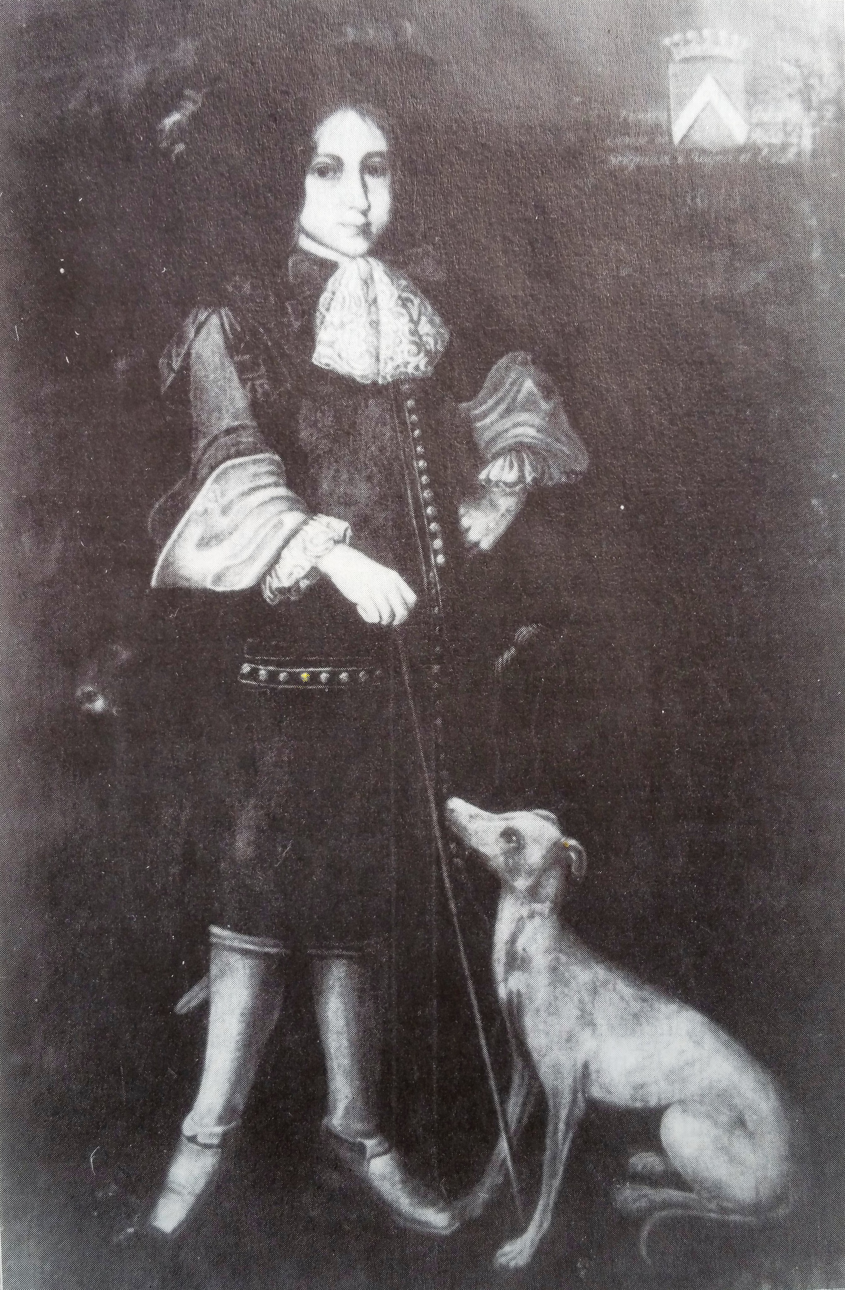 François Gabriel de Poligny, seigneur d' Evans